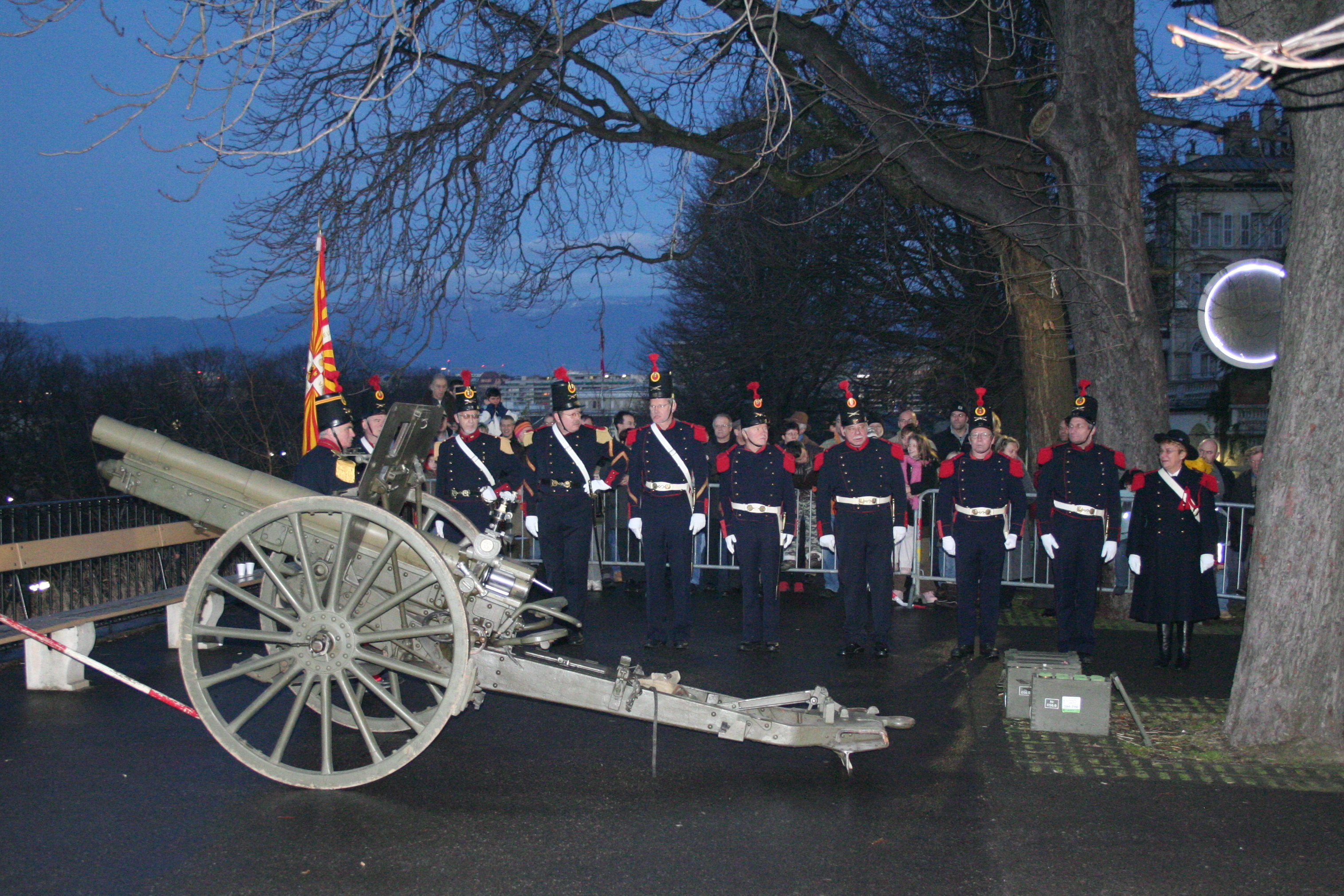 Canon prêt à tirer pour commémorer la Restauration genevoise.